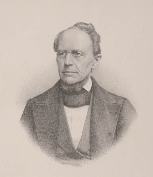 Portät des Magnus Friedrich Steindorff (* 29. Mai 1811 auf Gut Behrensbrook, Herzogtum Schleswig; † 22. Juni 1869 in Kiel), deutscher Arzt und Mitglied der Frankfurter Nationalversammlung. Künstler: Johann Heinrich Wittmaack (1822–1874)